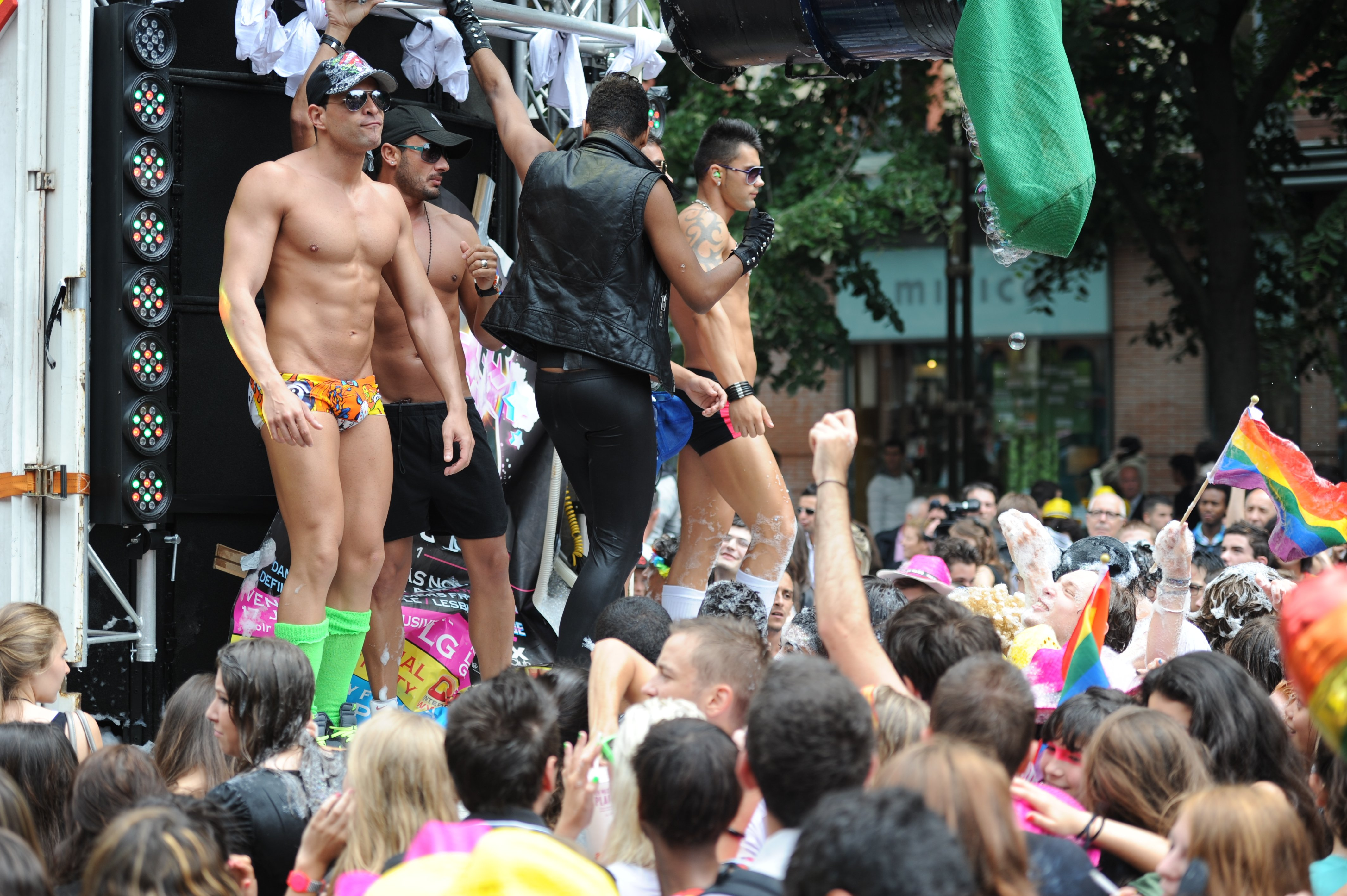 Dançarinos Go-go numa Parada de Orgulho em Les Minimes, Toulouse, Pirineu Central, França.